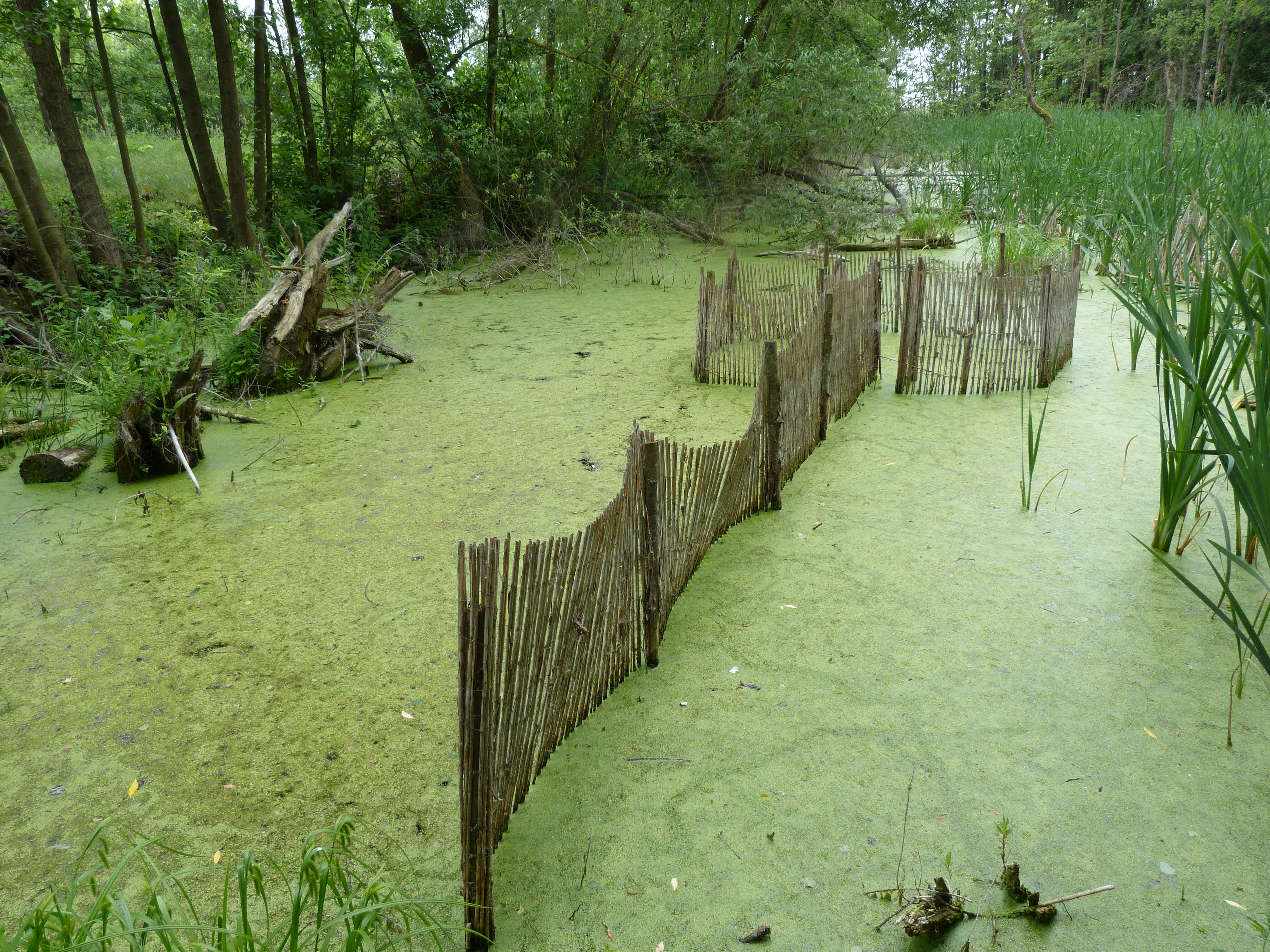 A felvétel 2013. Május 24 –én pénteken készült a Diás Szigeten (Kis Balaton, Fenékpuszta). Vejsze (Halfogó berendezés). ©© Published under Creative Commons in the Metapolisz DVD line. All of the photos and vids in the Metapolisz DVD line are under Creative Commons and can be used even for commercial – for profit – purposes. Recommended Citation Derzsi Elekes Andor: Metapolisz DVD line